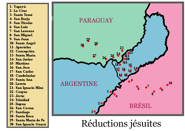 Carte des réductions jésuites en français, réalisée à partir de Reducciones.